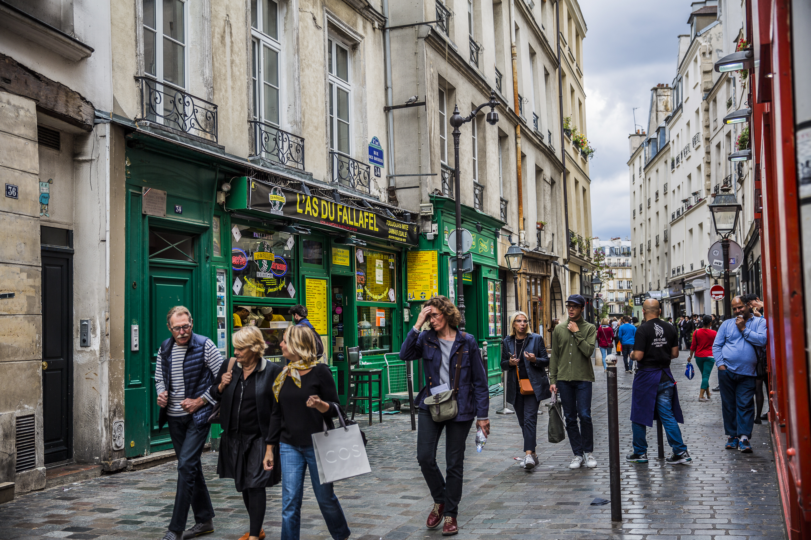 Rue des Rosiers, Paris, France.